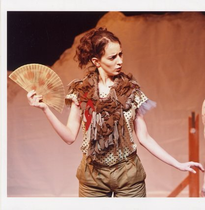 רוני דותן